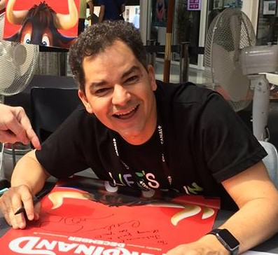 Carlos Saldanha au festival international du film d'animation d'Annecy 2017